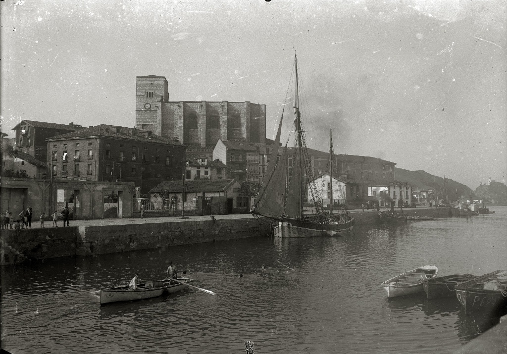 Título original: Puerto de Zumaia con embarcaciones (1/1) Localización: Zumaya (Guipúzcoa)